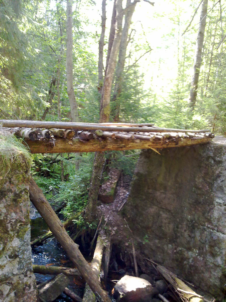 Вид пешеходного лесного моста через реку Серебристую (Лоунатйоки), построенного на устоях старого каменного моста для парового трамвая на проспекте Трубецкого в дачном поселке Лоунатйоки (Заходское)